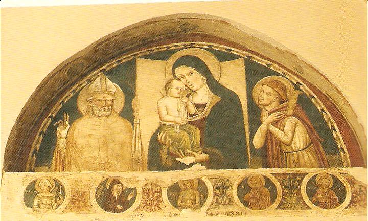 Madonna con Bambino tra i santi Agostino e Amico, affresco di Antonio da Atri sulla lunetta del portale della chiesa di Sant'Amico a L'Aquila (1381).